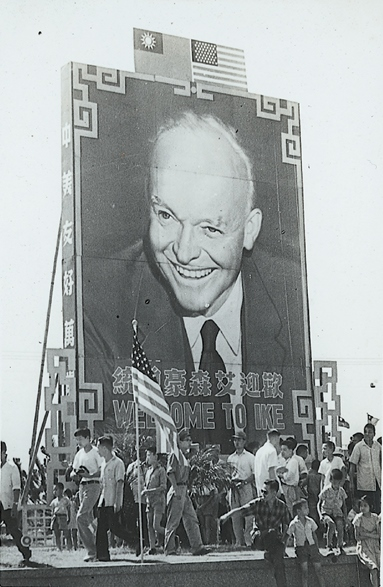 美國總統艾森豪於1960年6月18日訪問臺灣時的大型歡迎海報看板，最上方為中華民國國旗與美國國旗。